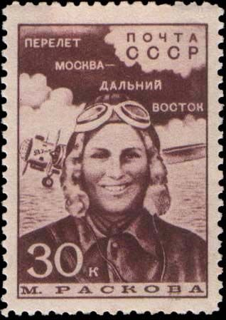 Почтовая марка СССР - Раскова Марина Михайловна, Герой Советского Союза